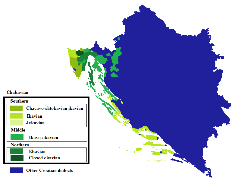 Čakavski dijalekti